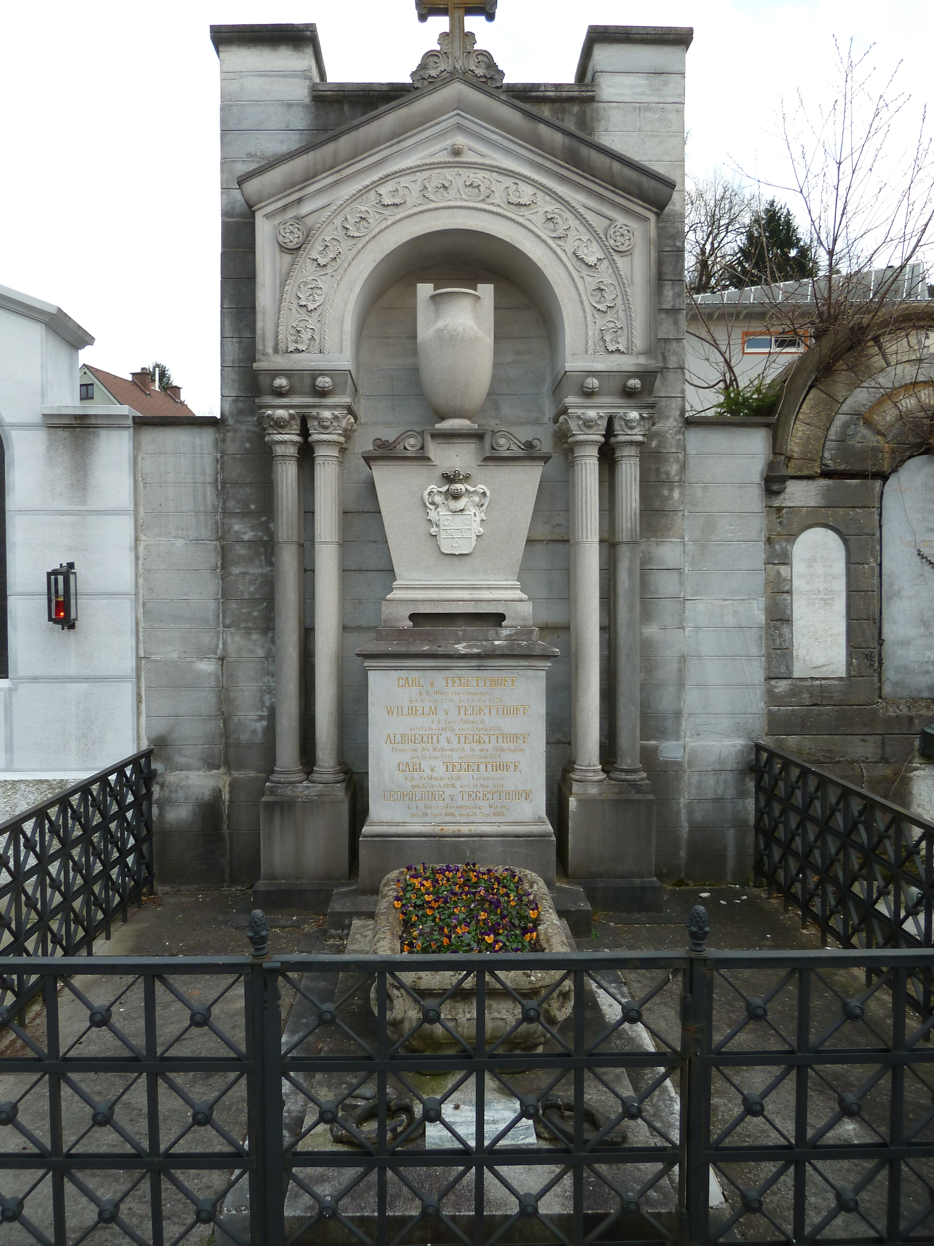 Grabmal Wilhelm von Tegetthoff (1827-1871), Vizeadmiral und Marinekommandant Friedhof Graz-St.Leonhard